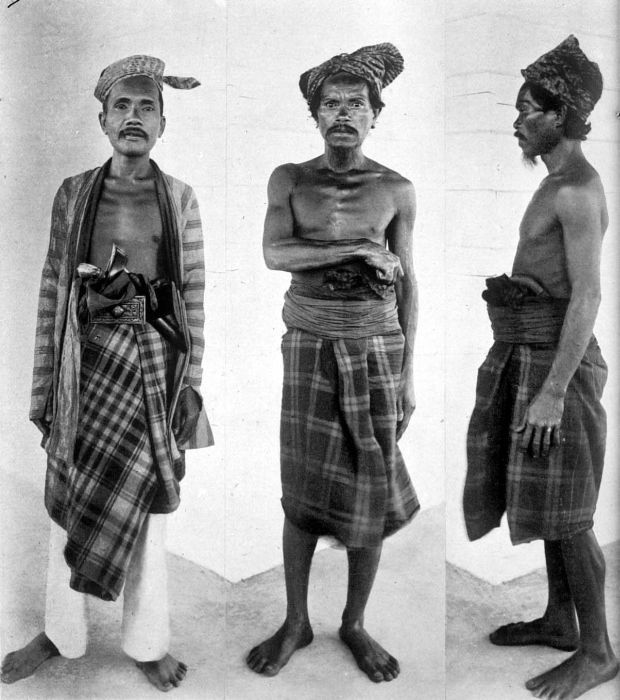 Repronegatif. Tiga pria dari pulau Muna, Sulawesi Tenggara. Gambar kiri adalah seorang pria bangsawan, sedangkan gambar tengah dan kanan menunjukkan masyarakat Reha.